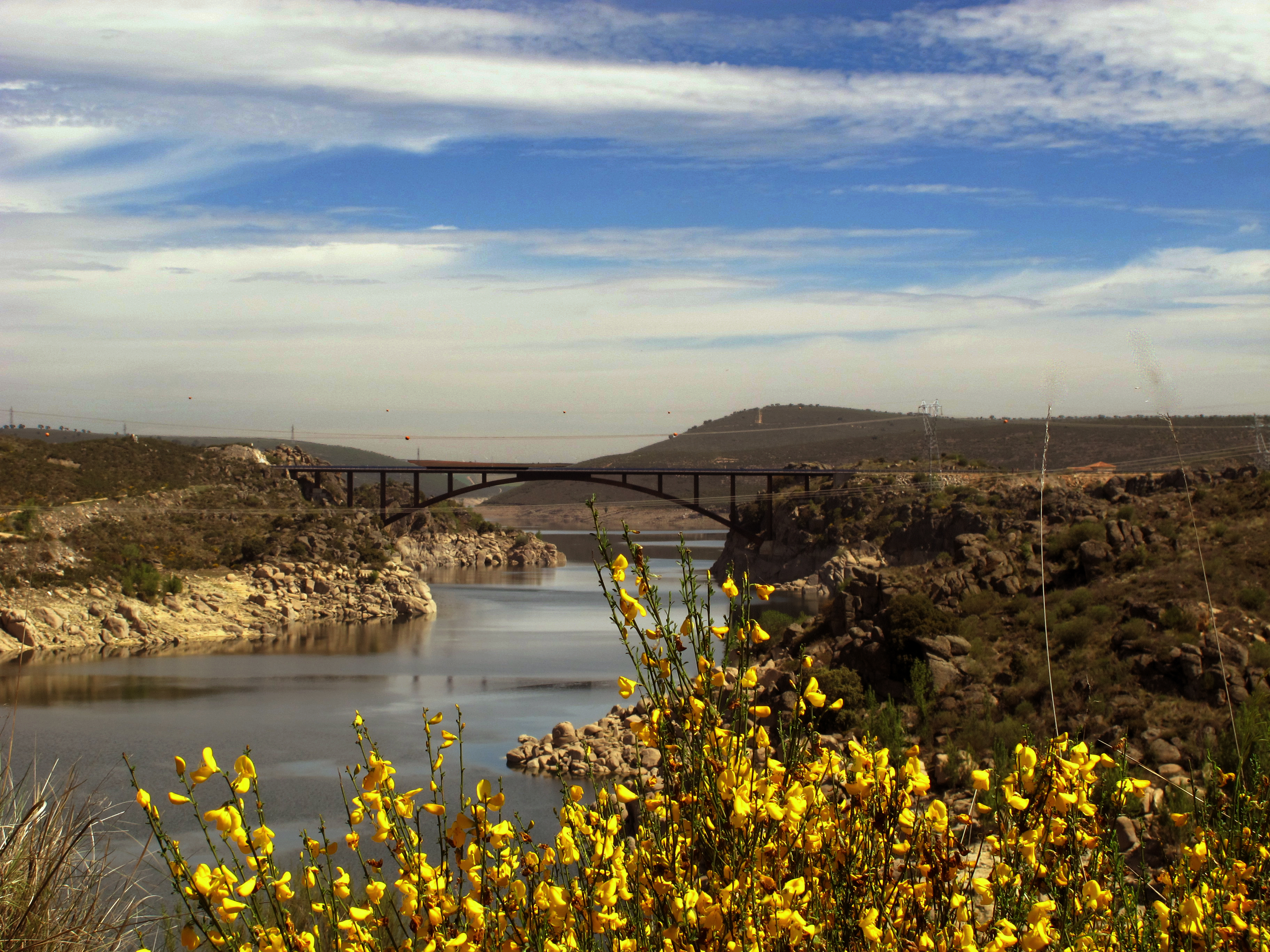 De los grandes puentes en arco se inscribe el de Ricobayo, una estructura mixta de arco de acero relleno de hormigón con la que se han construido muy pocos arcos en España y en el mundo. El arco de Ricobayo, Zamora, es además el mayor arco de metal de Europa. La empresa Ferrovial-Agroman, comienza en mayo de 1993, la construcción de un puente metálico de un solo arco, resultando esbelto y majestoso con 168 m. Asentado sobre las paredes graníticas de ambos lados del embalse Ricobayo formando un viaducto de 220 m. de largo y a 24 m. sobre las aguas. En junio de 1995 fue inaugurado.